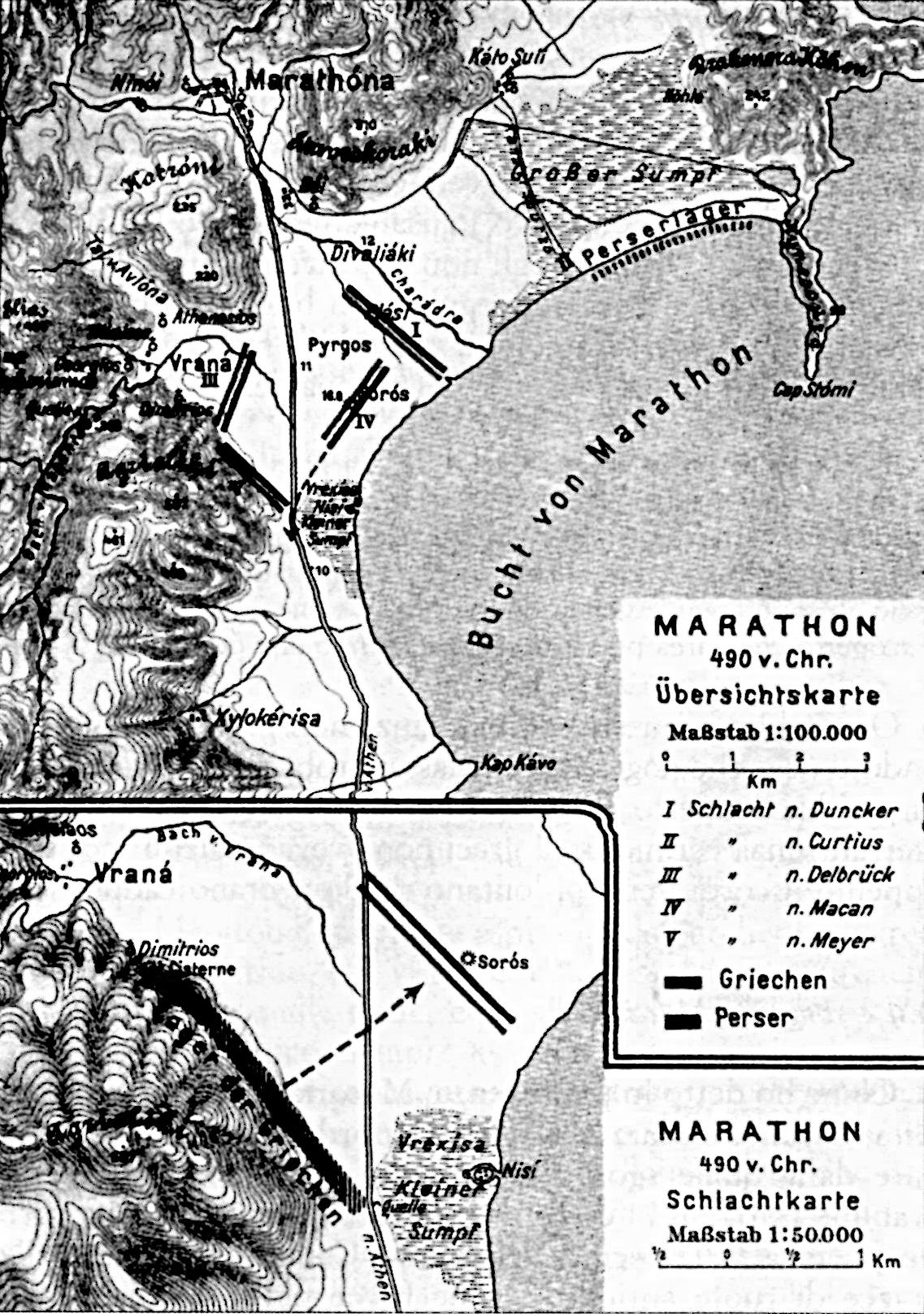 Antica mappa dell'area della battaglia di Maratona (Attica, Grecia).